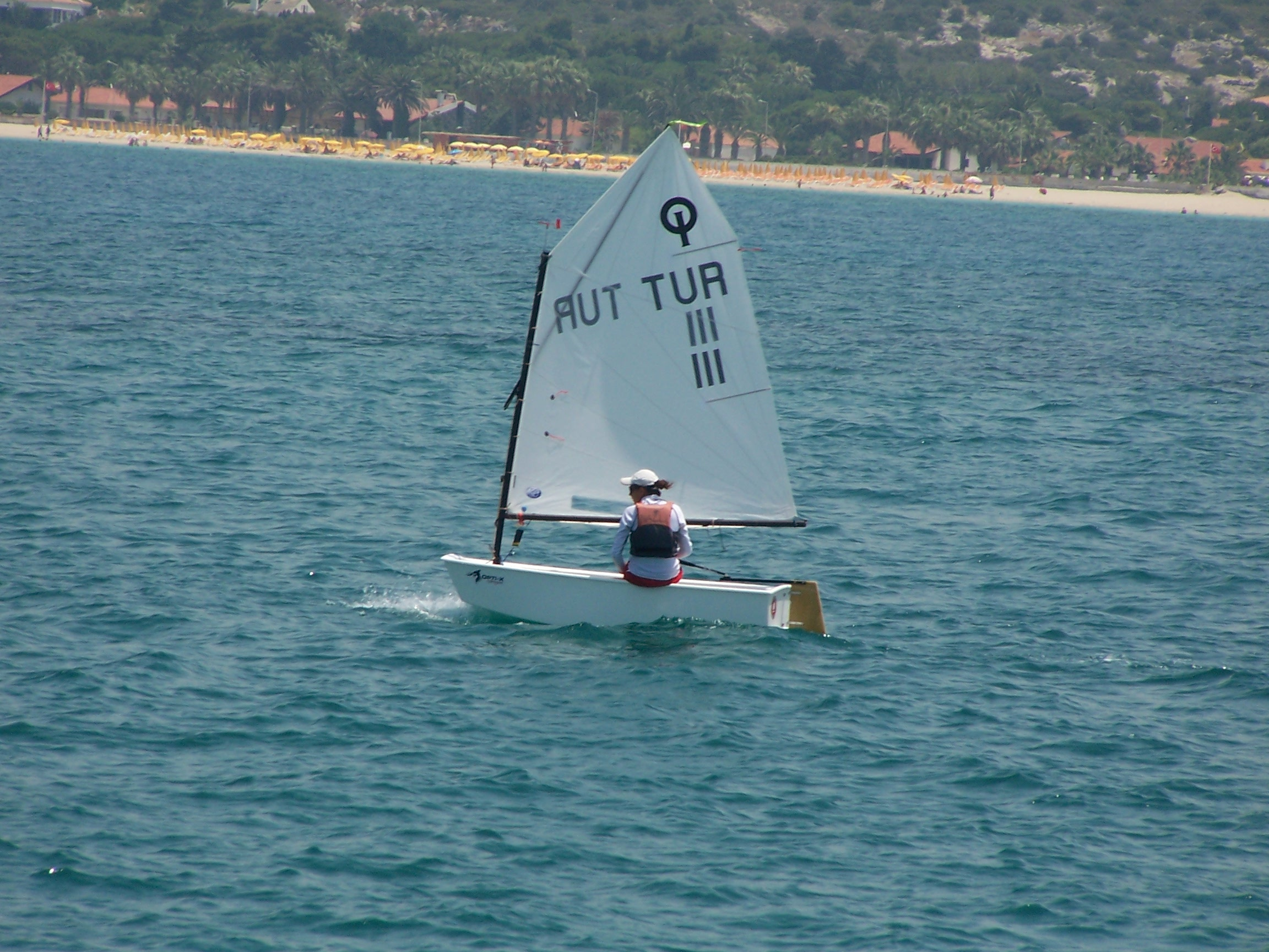 Nazlı Karadeli (b. 1993) sailing in Çeşme, İzmir.